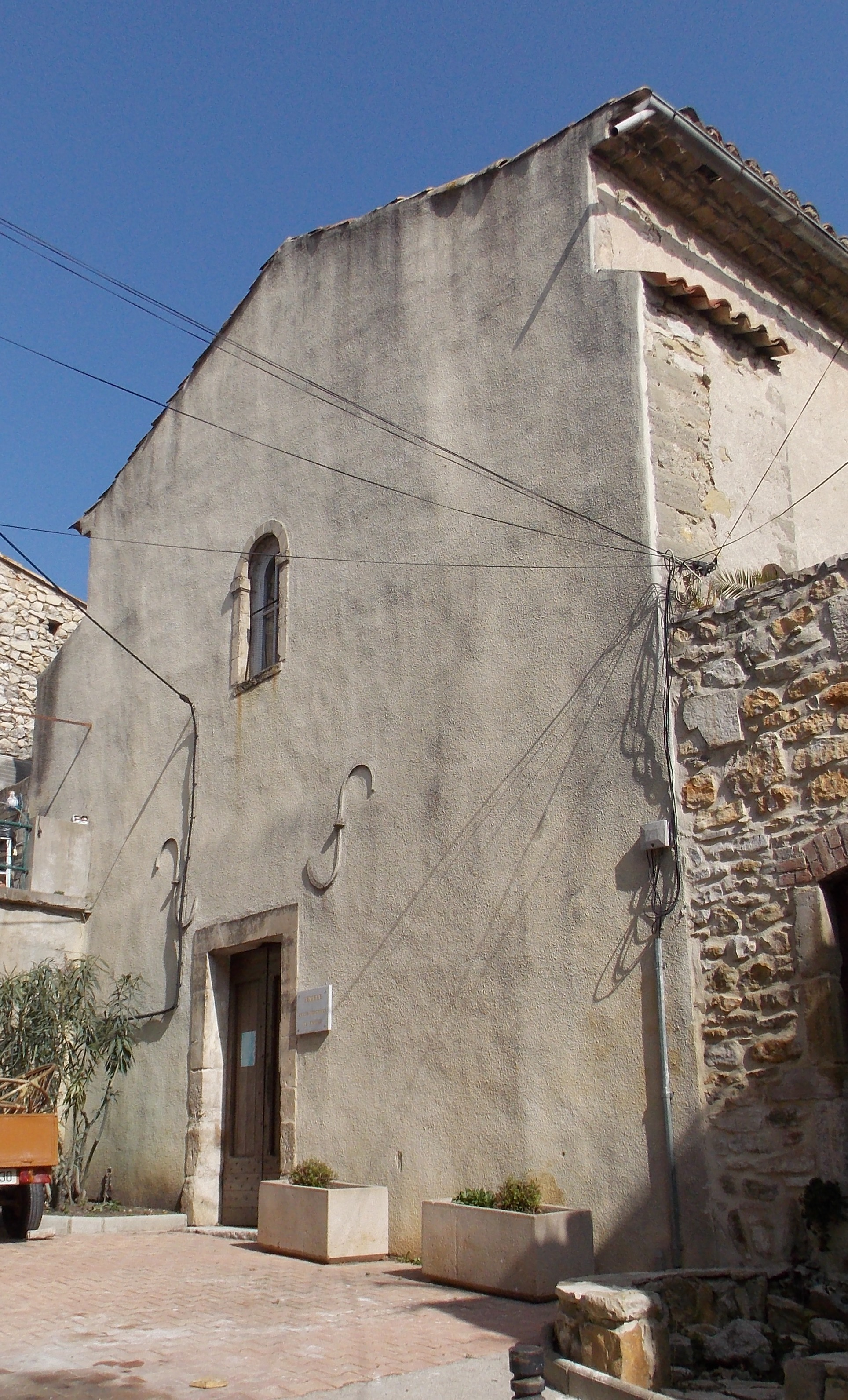 Eglise réformée de France de Ners.